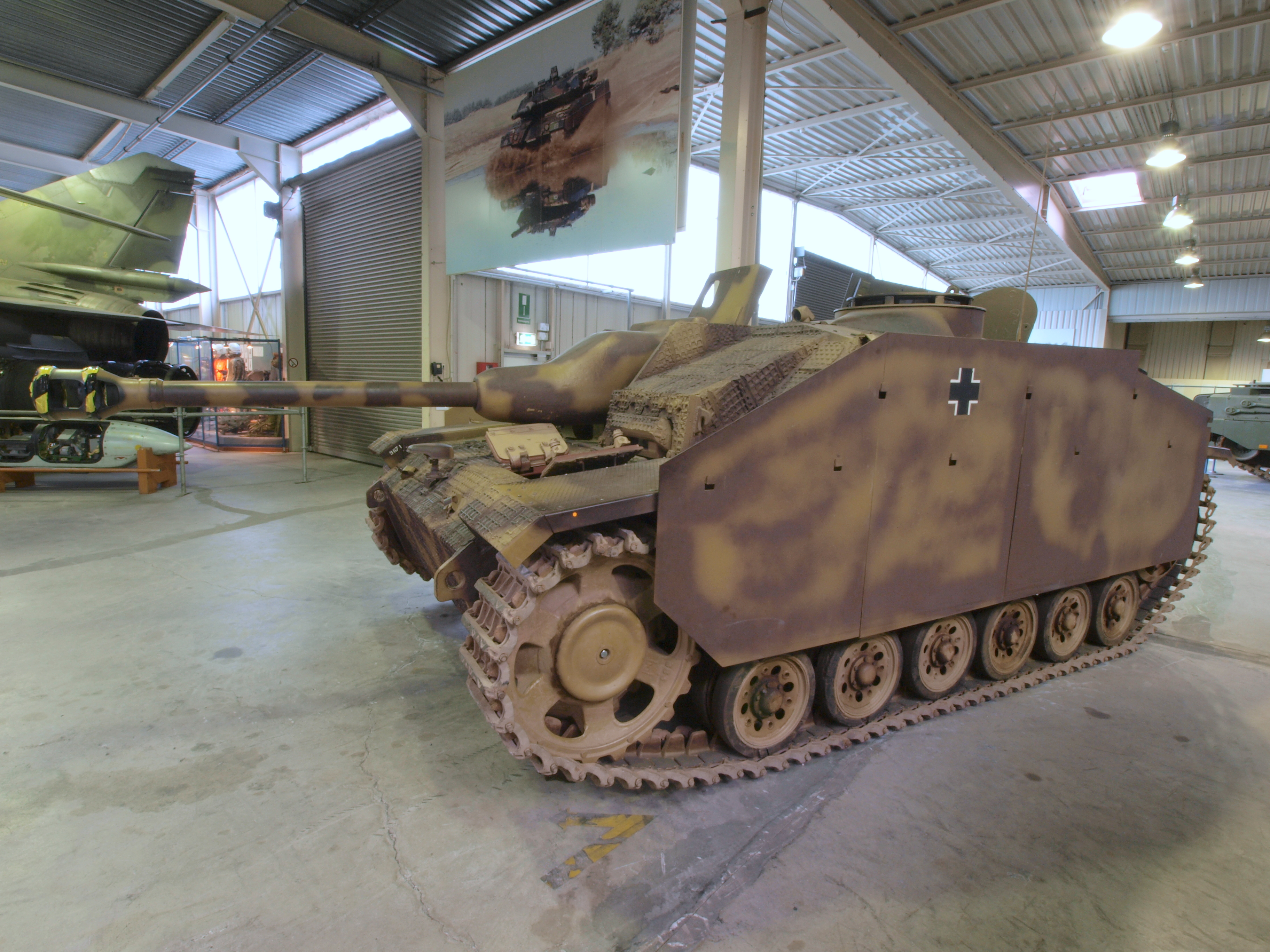 Sturmgeschutz III G SdKfz 142/1